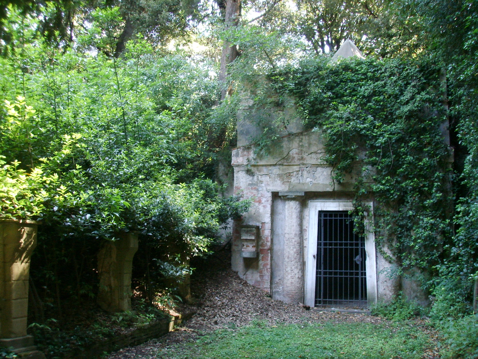 see fileneme